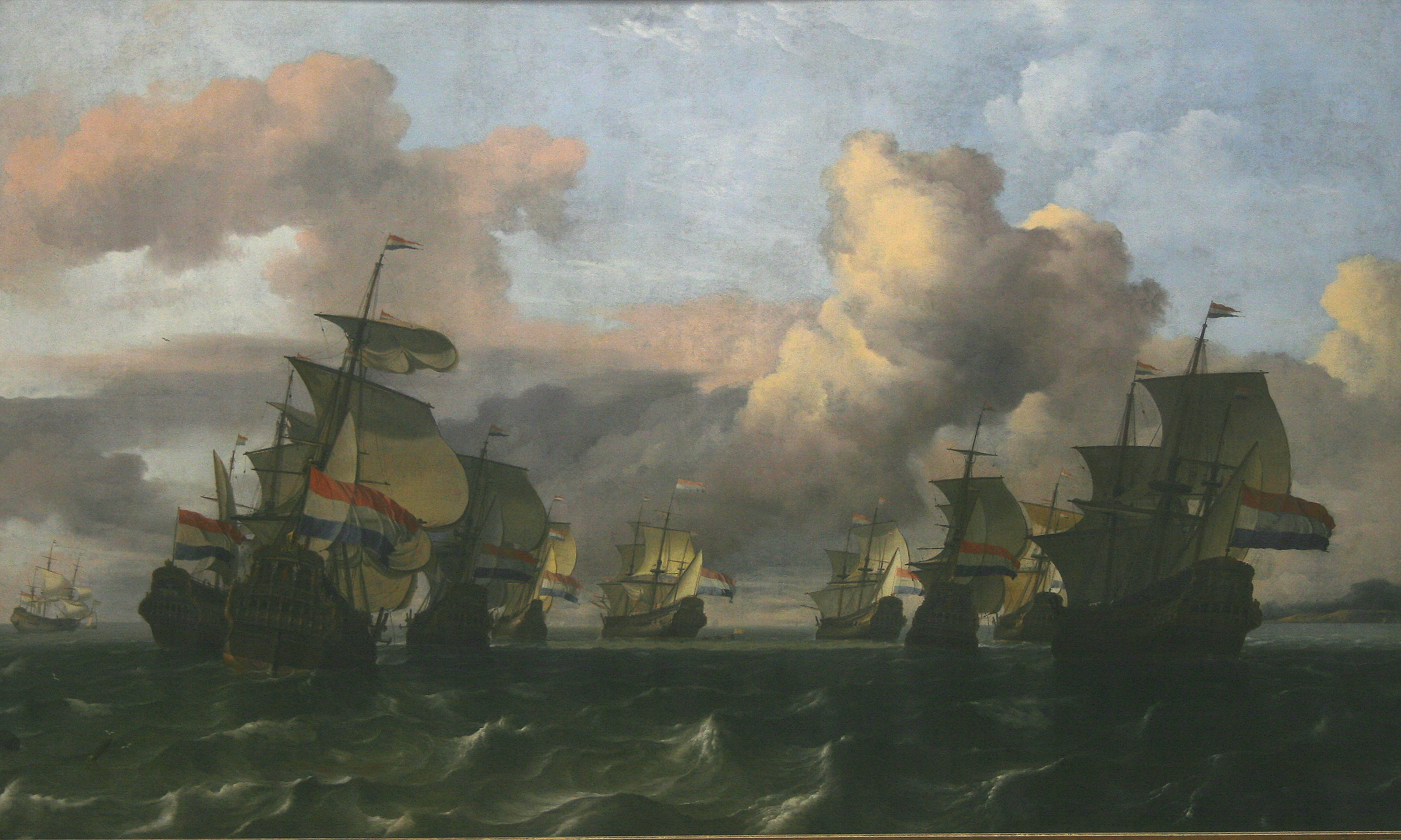 La retour de la flotte de la Compagnie des Indes néerlandaises